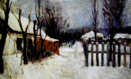 Головков Герасим Семенович Пейзаж (1890-е)